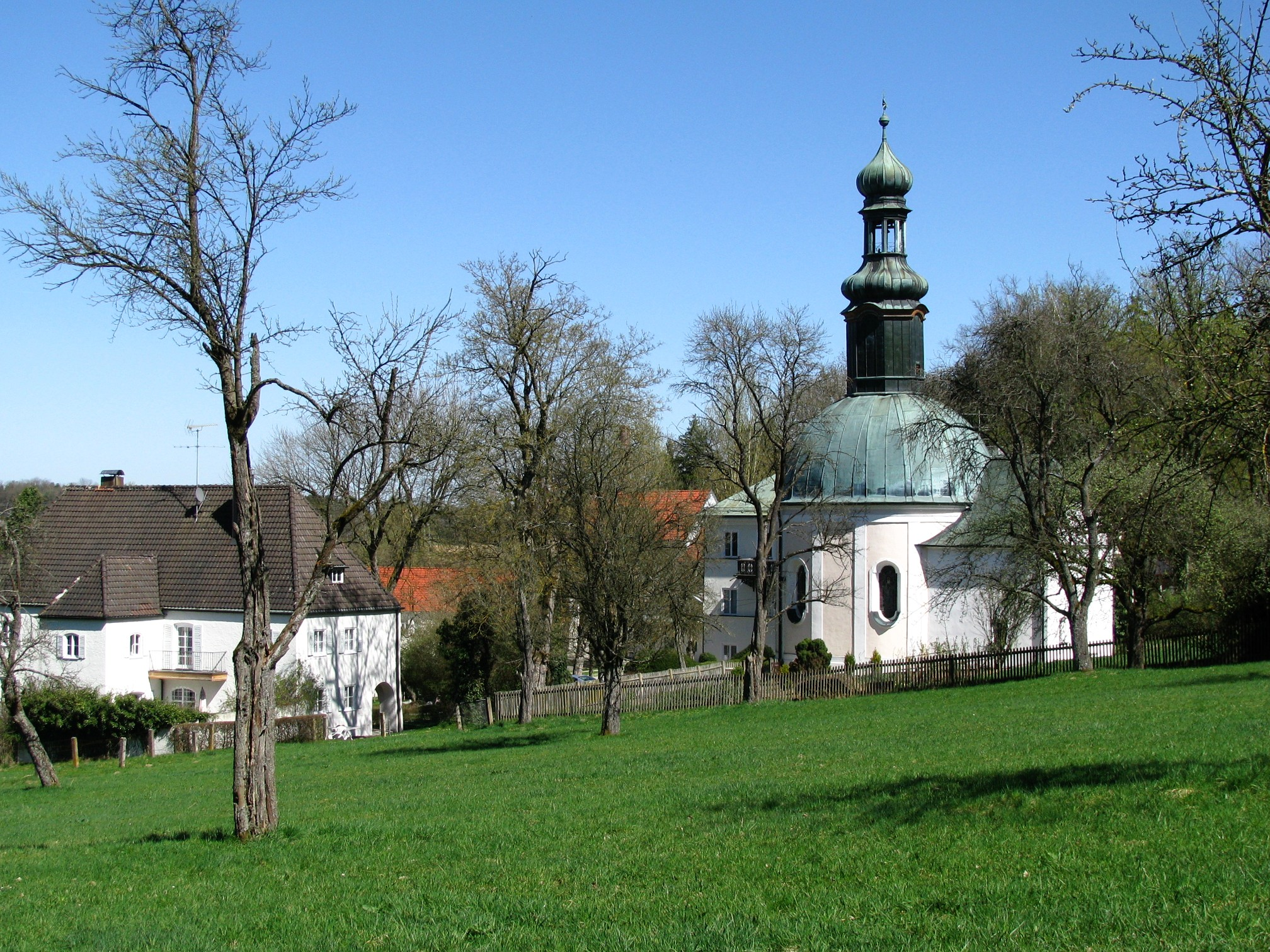 Mariabrunn im Landkreis Dachau